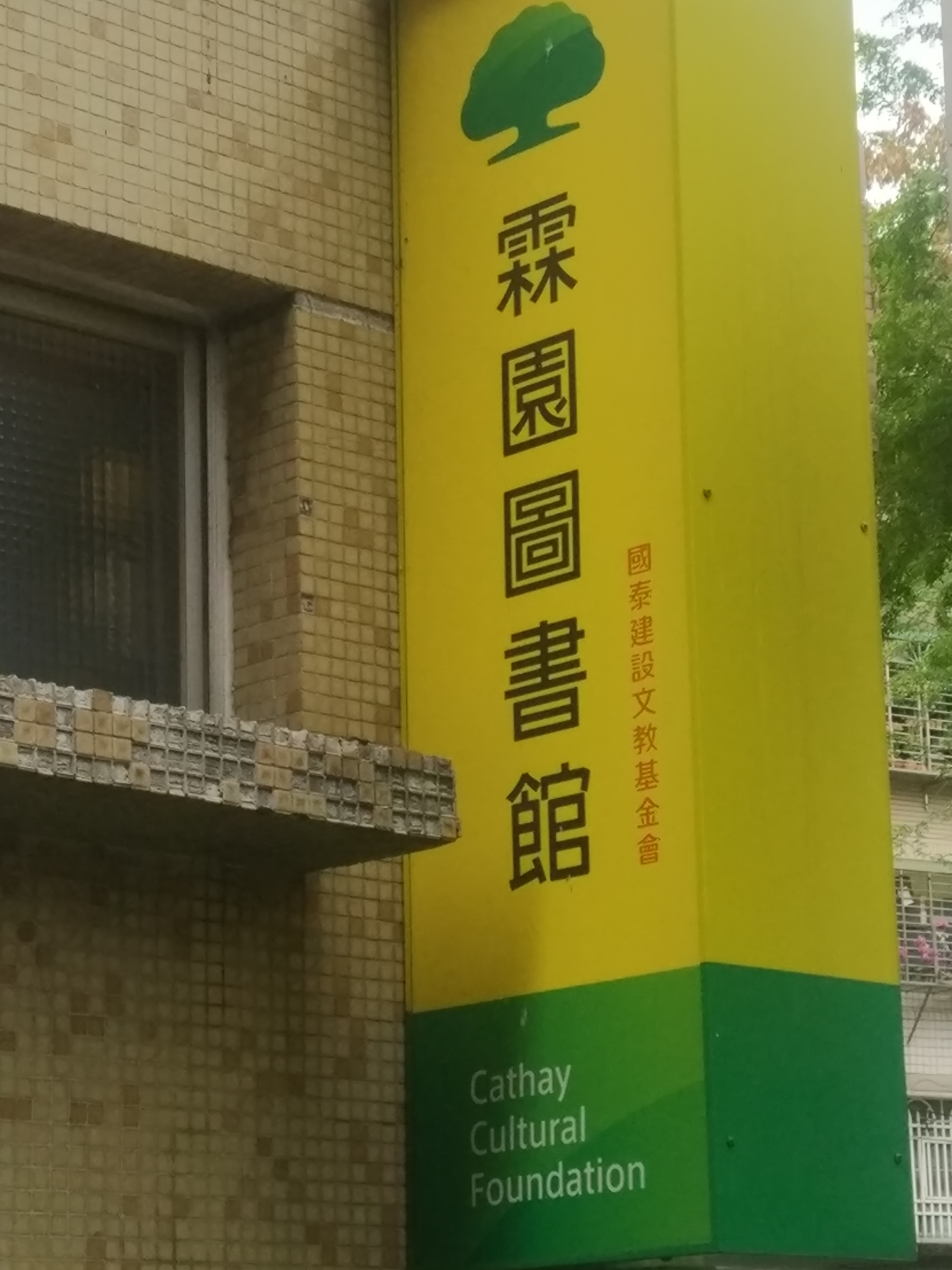 國泰建設文教基金會霖園圖書館招牌。